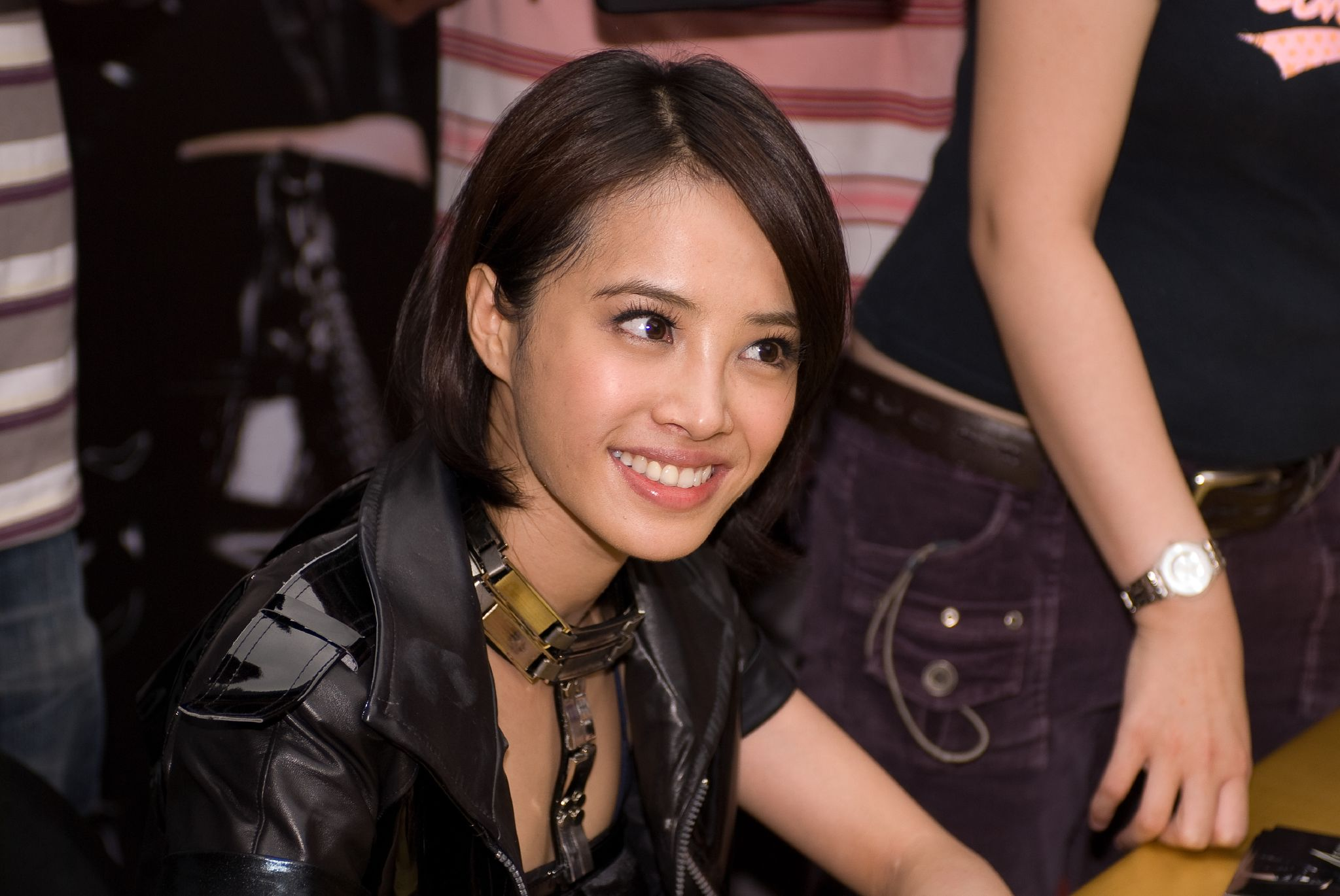 Jolin Tsai